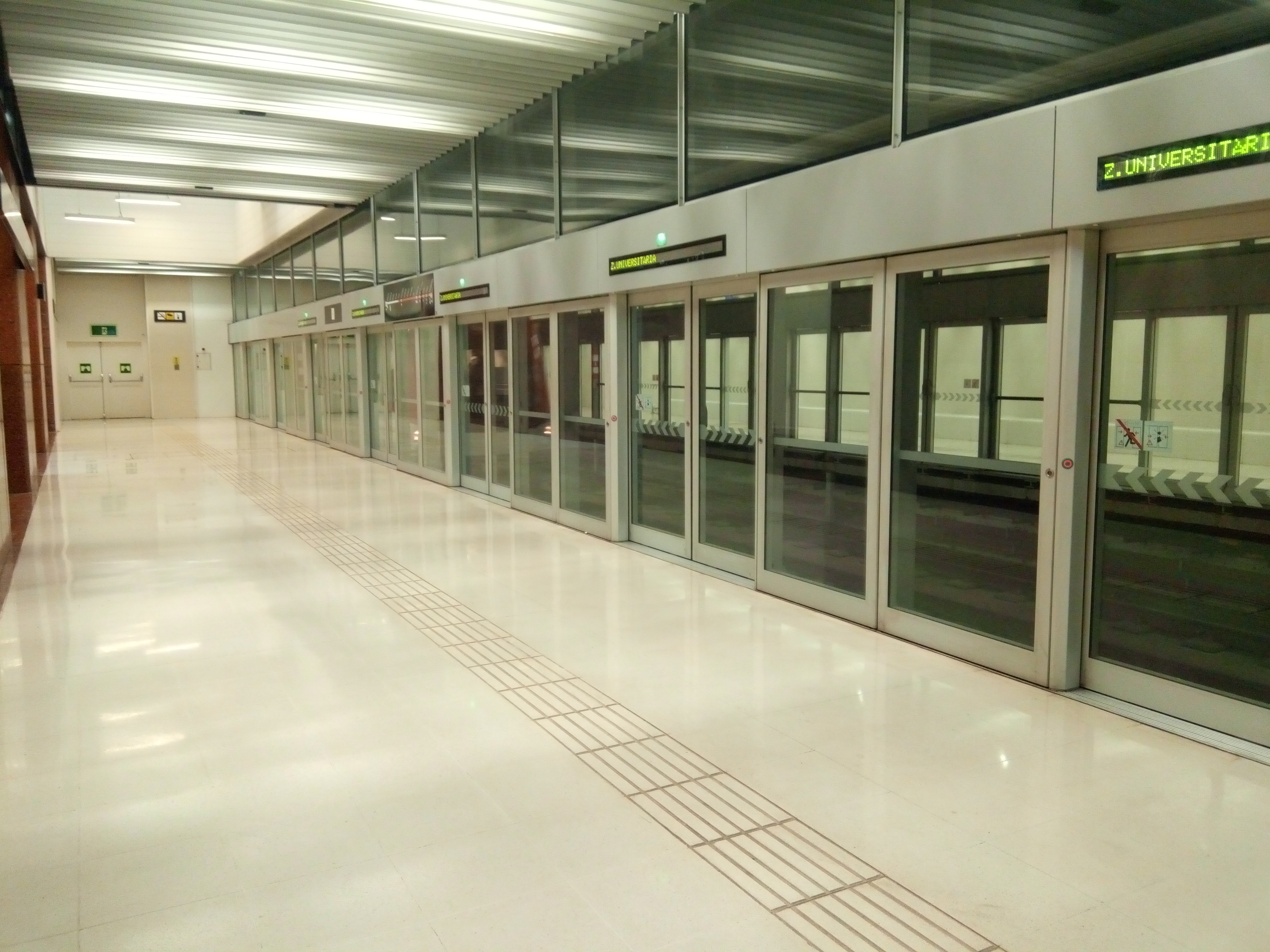 Estació Cèntric de la línia 9 de metro de Barcelona, ubicada al Prat de Llobregat